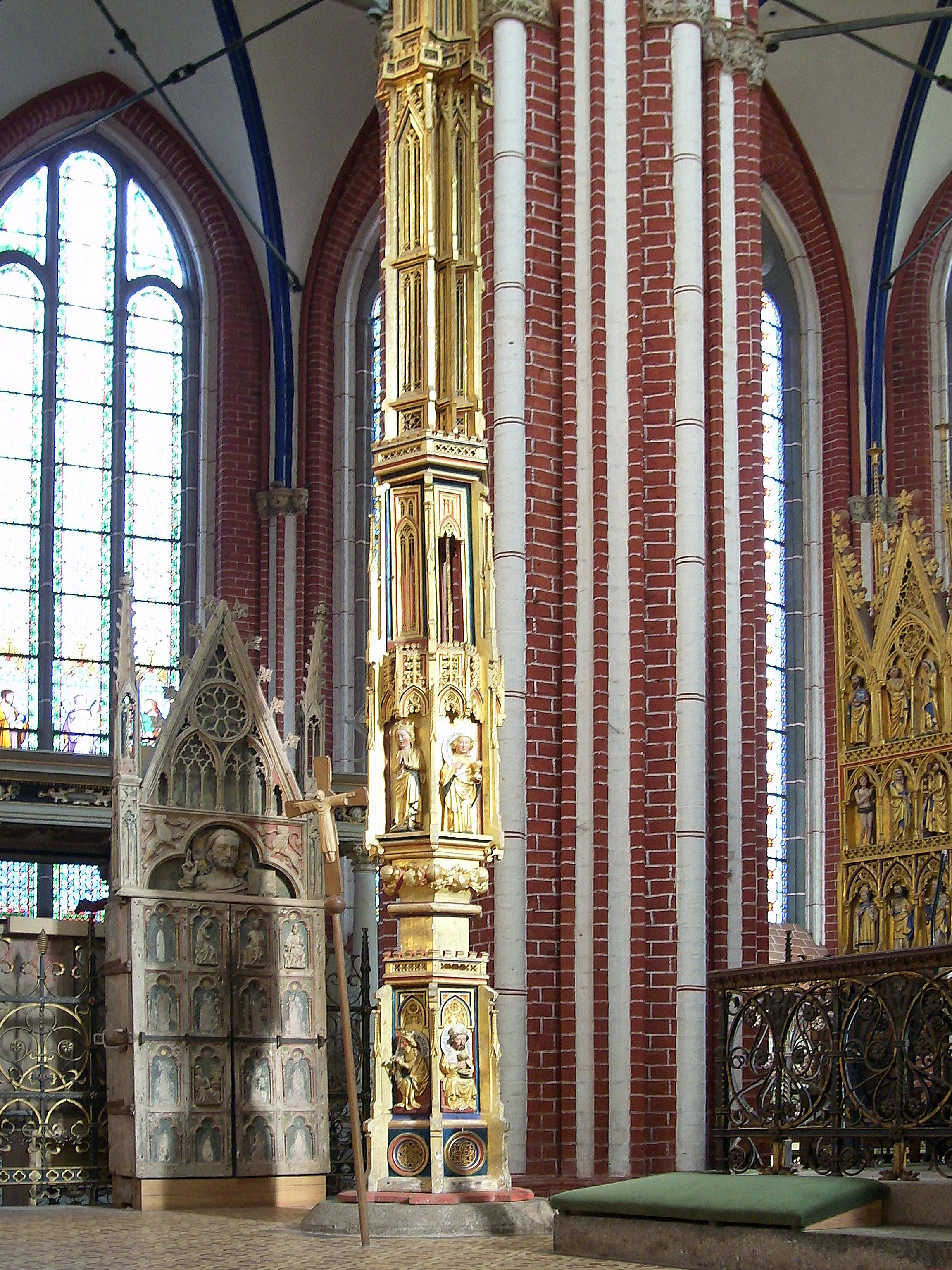 Bad Doberan: Münster - Altarraum - Hochaltar